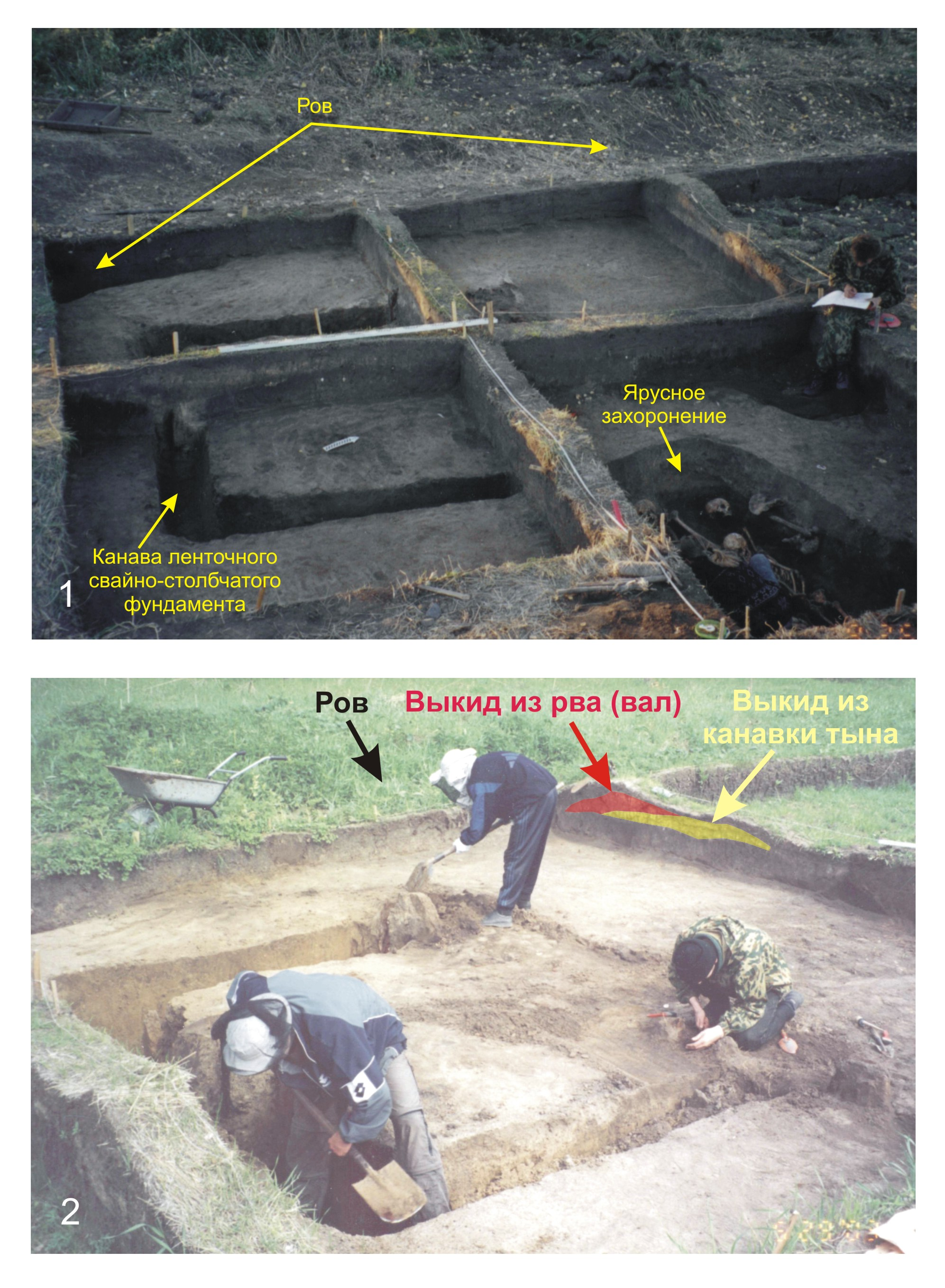 Рис. 15. Раскоп юго-западной набережной башни